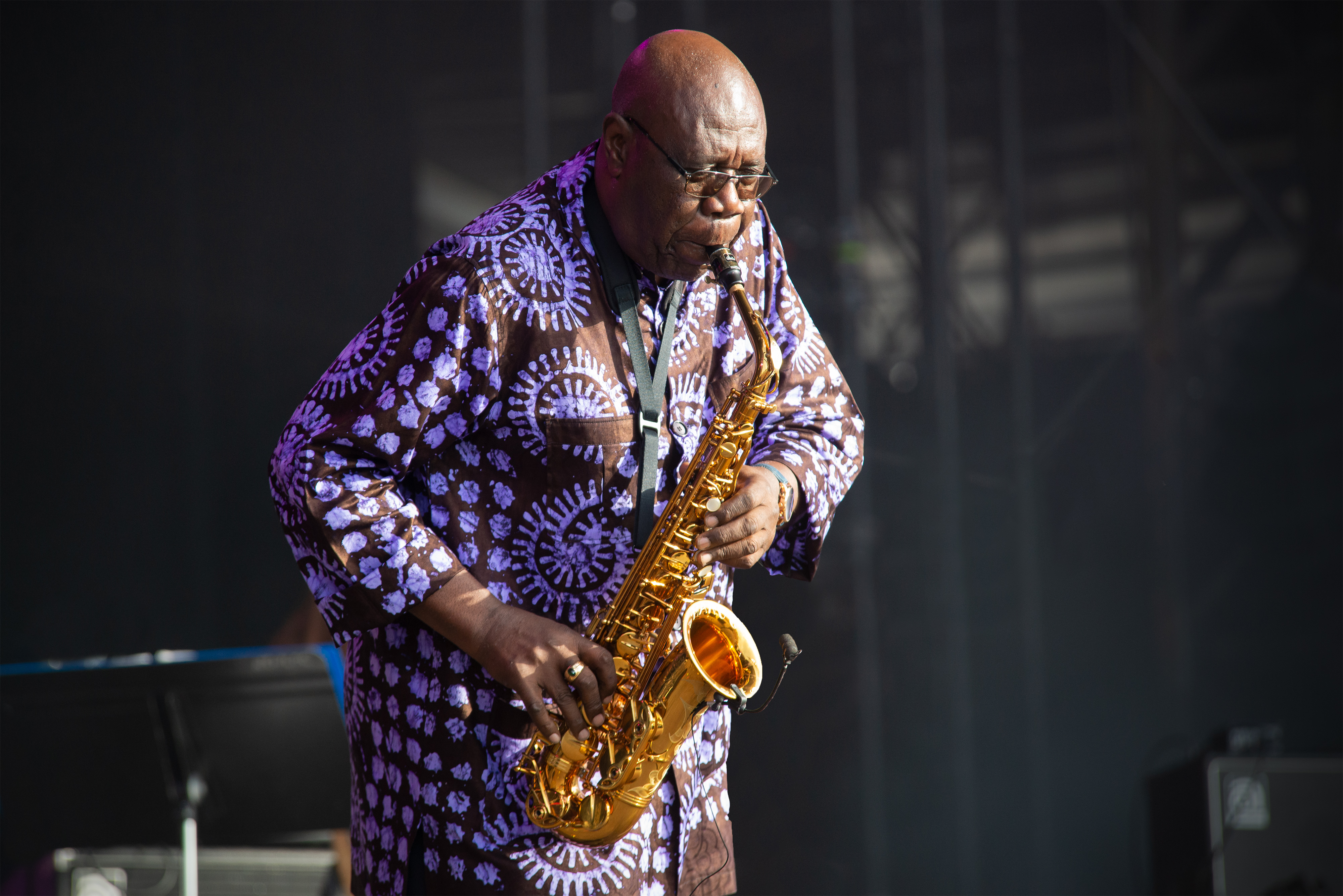 Concert de Manu Dibango au festival Les Escales, Saint-Nazaire, juillet 2019.